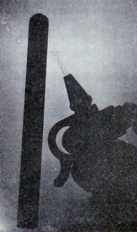 un tube à essai en verre est attiré vers le haut sous un jet d'air qui en contourne le but arrondi. a glass test tube is suspended under a vertical air jet flowing upside, which follows the round extremity